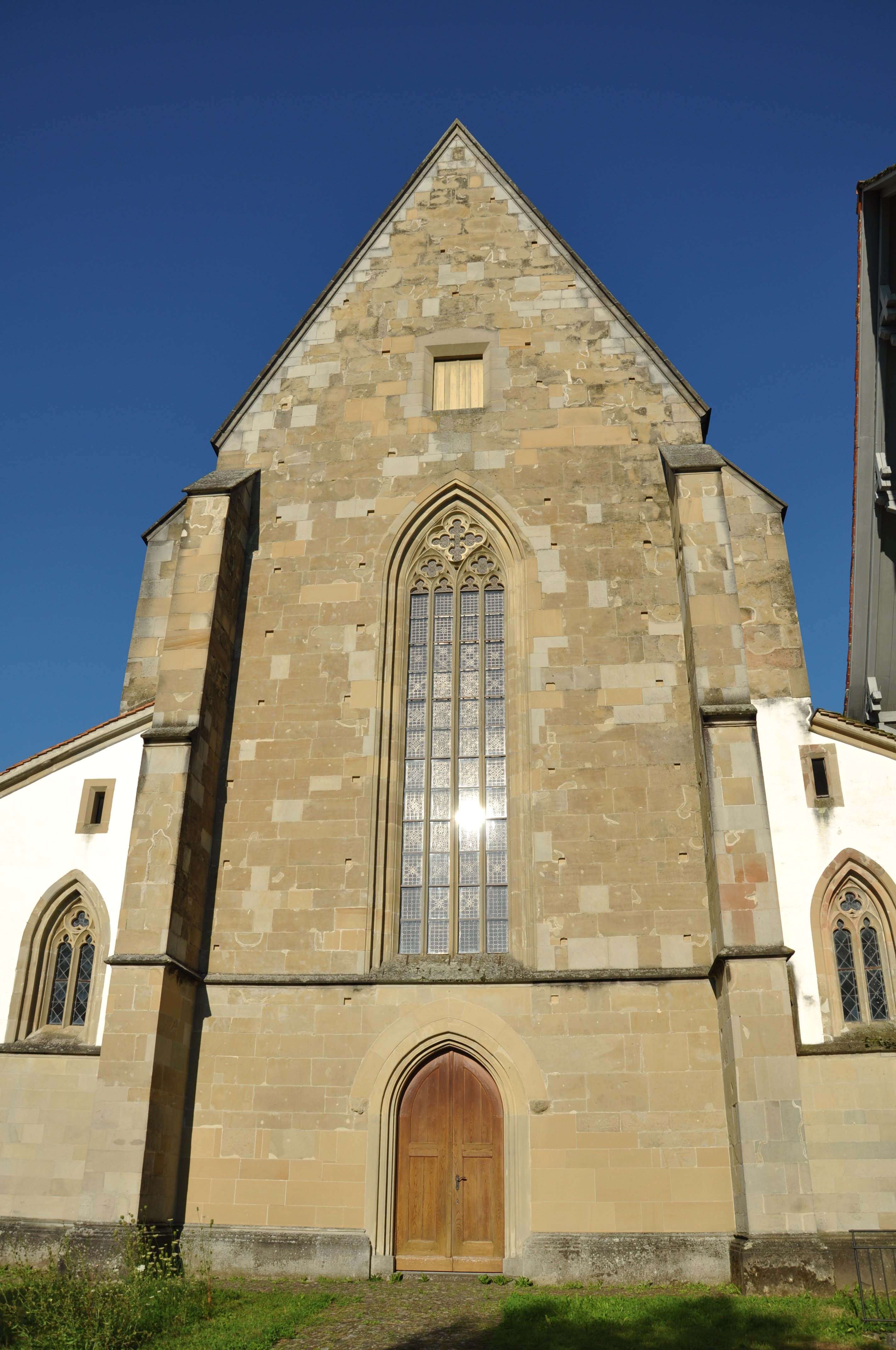 Kappel am Albis Ehemaliges Zisterzienserkloster